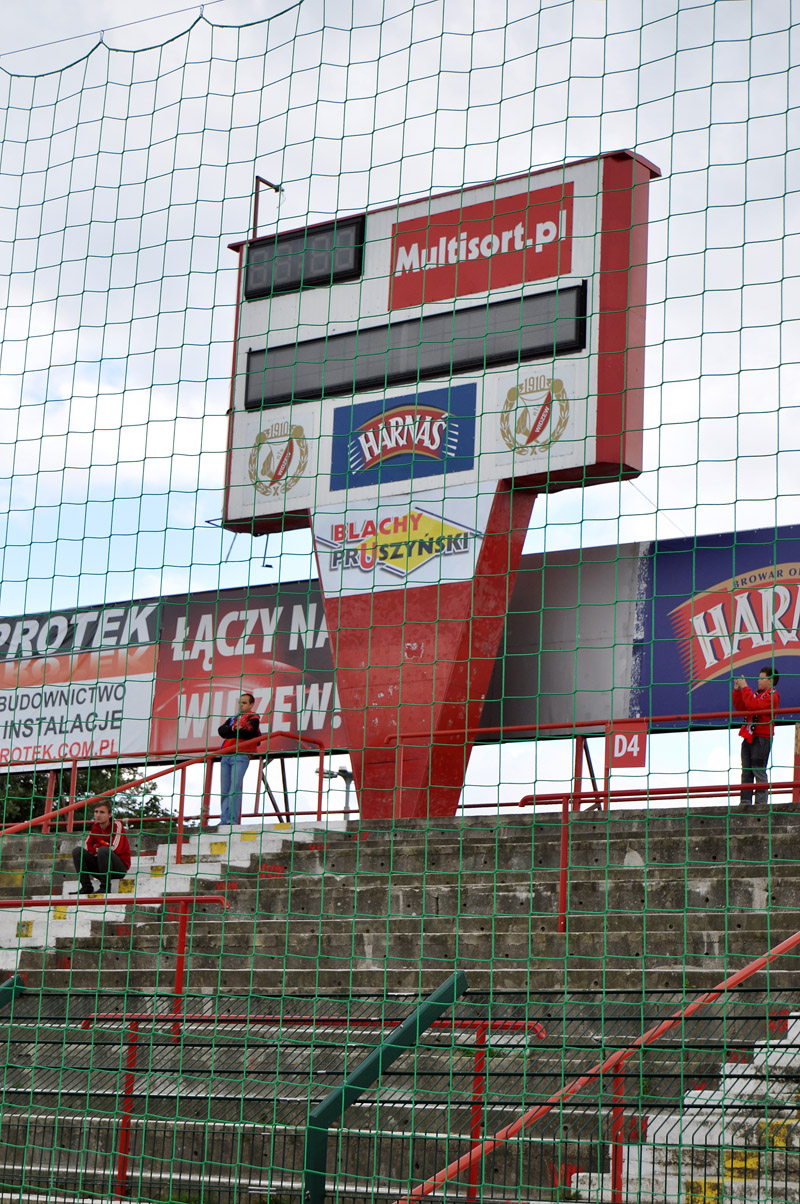 Stary stadion Widzewa - zegar na trybunie D